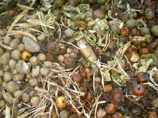 Compostage de déchets du jardin et alimentaires. Photo personnelle. GPL.